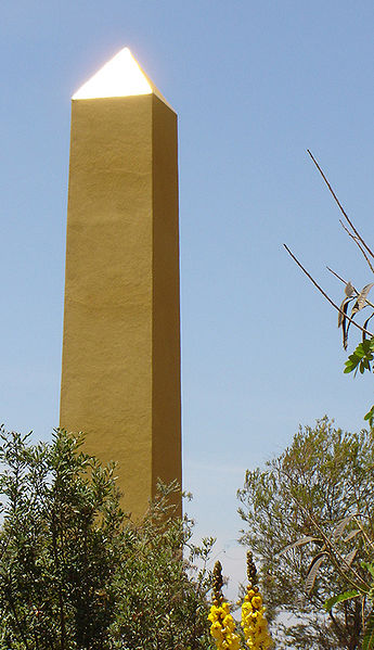 The Welcome Garden Obelisk at Alta Vista Gardens